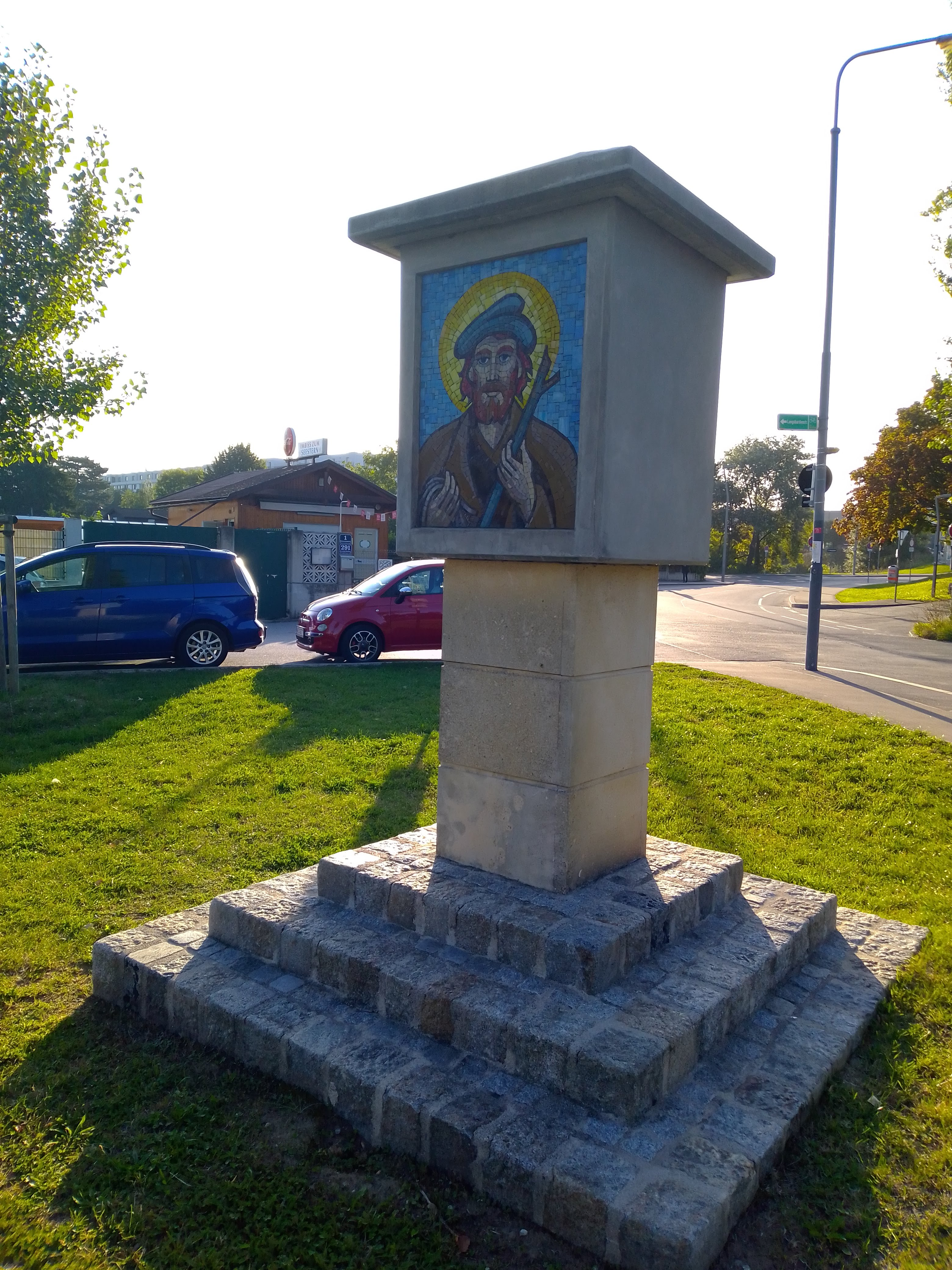 Vorderseite des Marterls für den Hl. Kolomann bei der Alten Donau in Wien